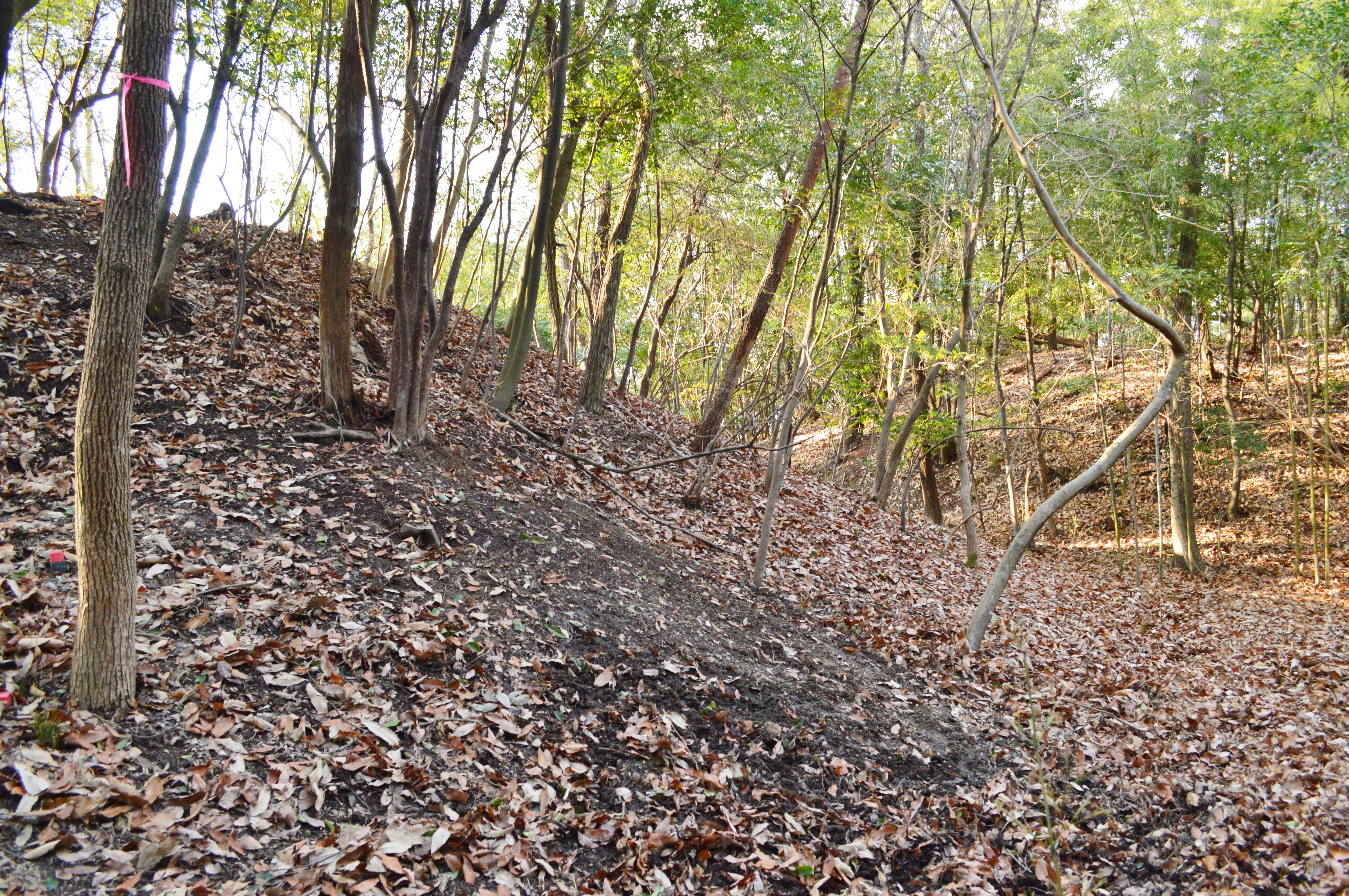 宇治二子山古墳 南墳から北墳を望む